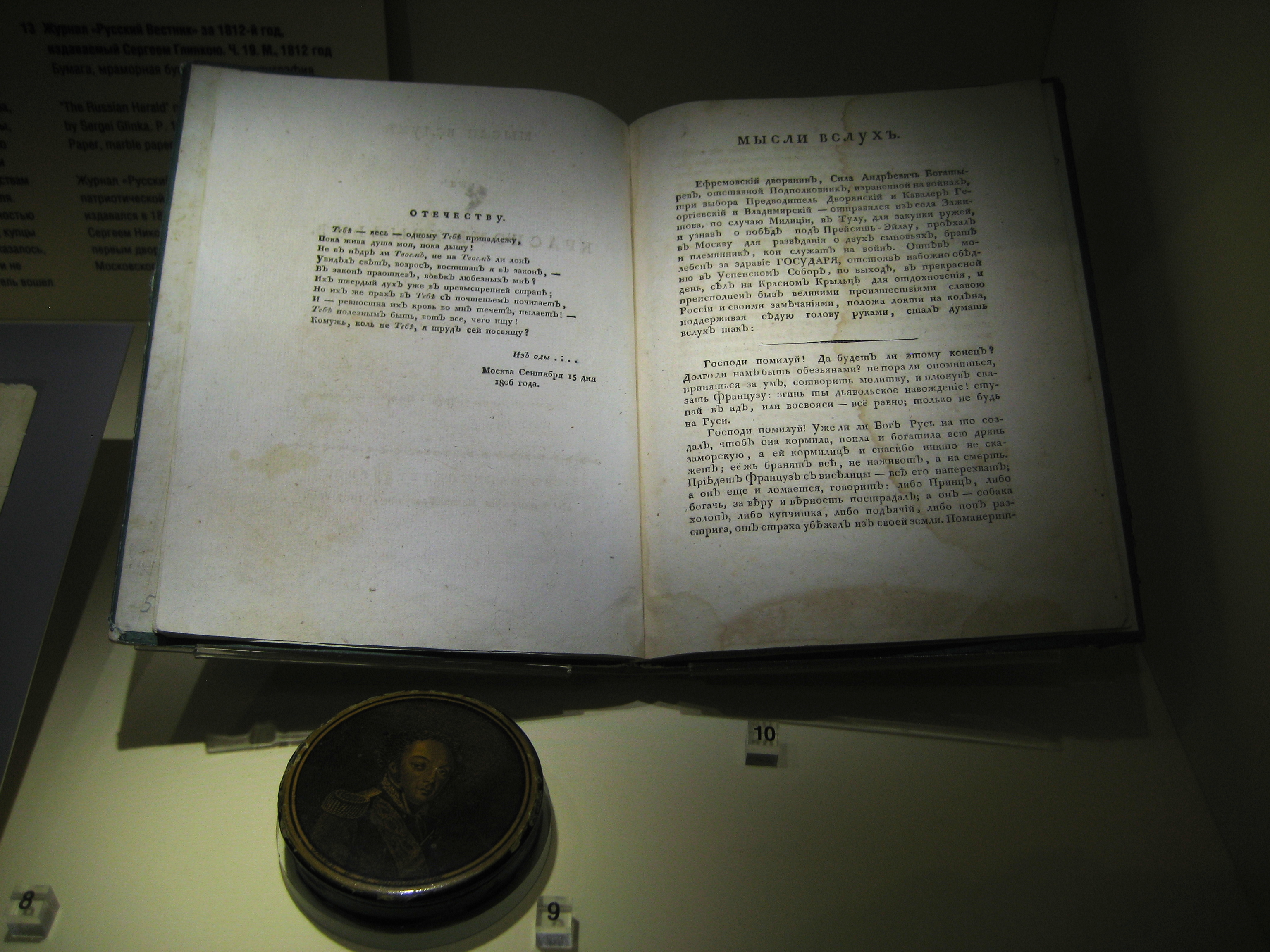 Музей "Бородинская панорама"